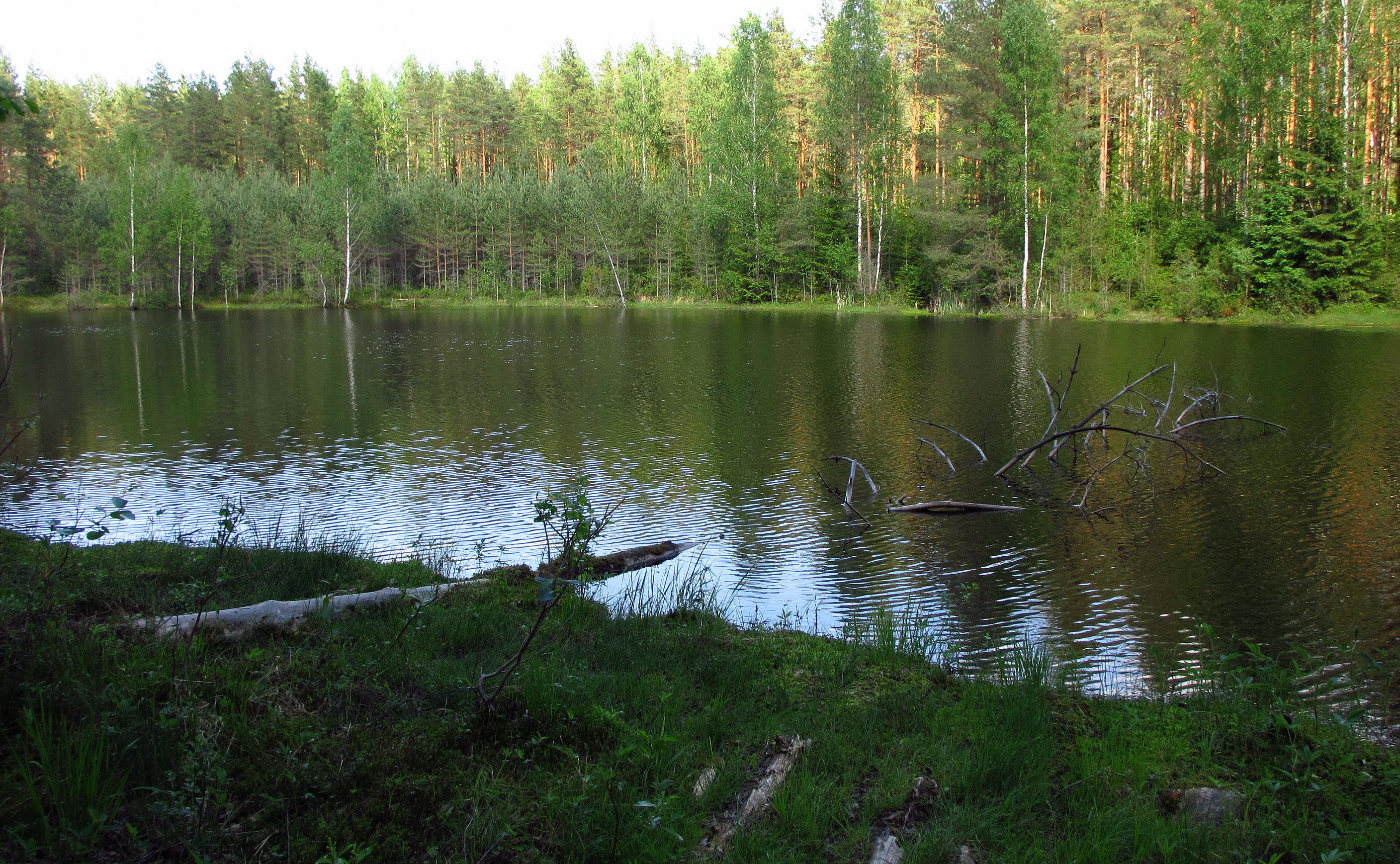 Kurtna Mätasjärv